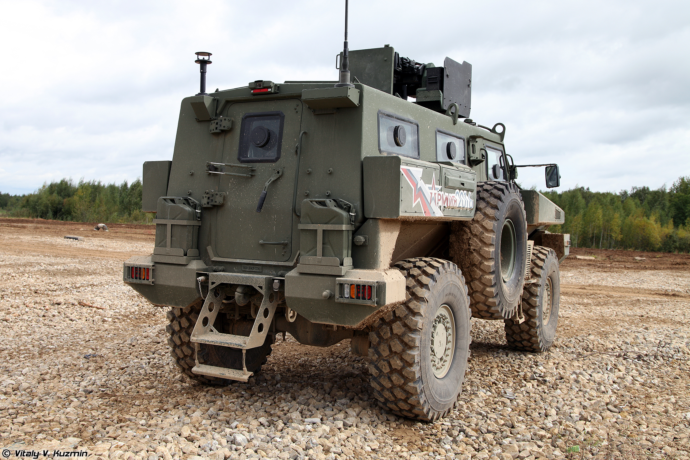 Бронеавтомобиль Арлан (Arlan armored vehicle)